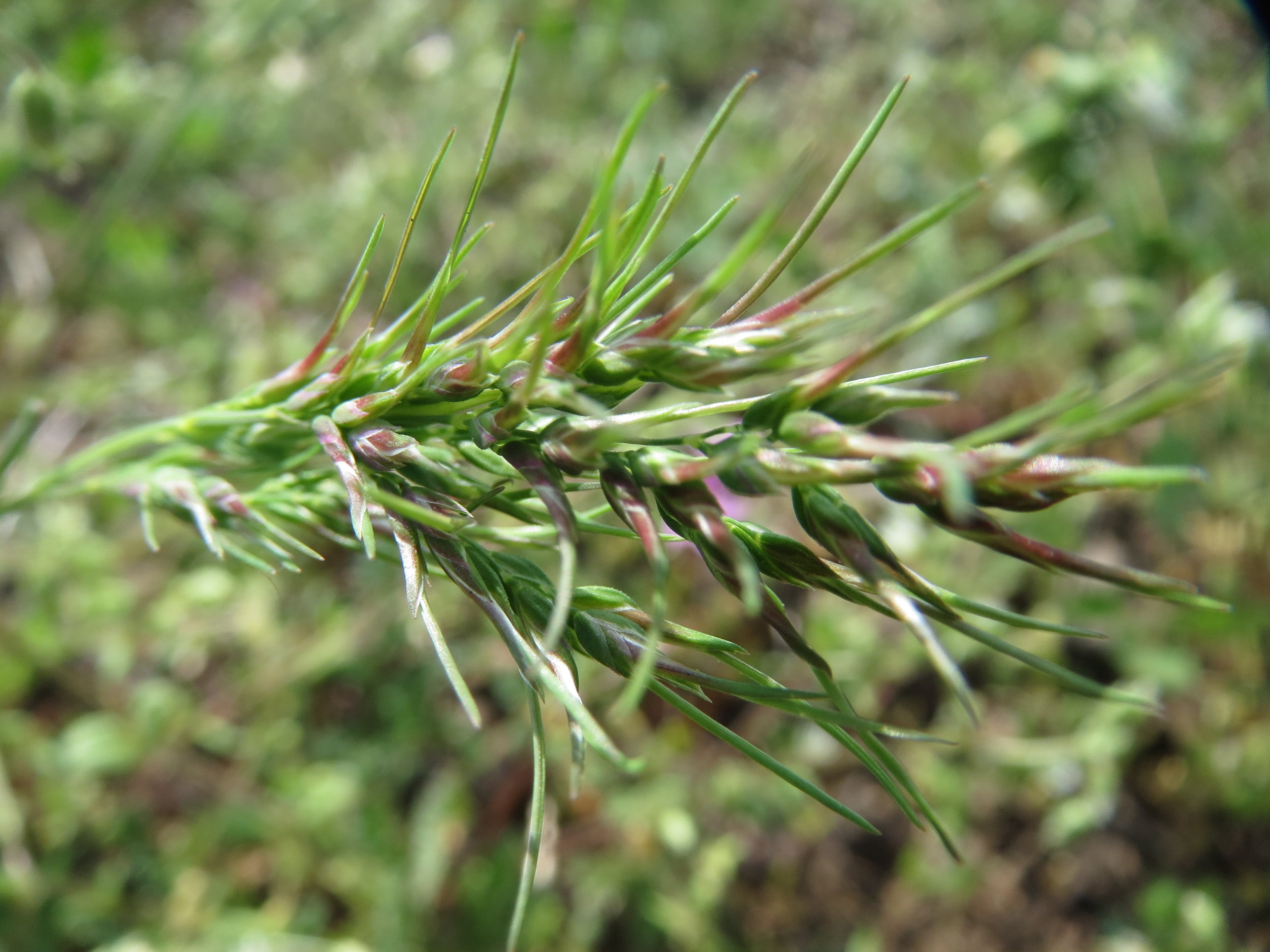 Zwiebel-Rispengras (Poa bulbosa) in Hockenheim